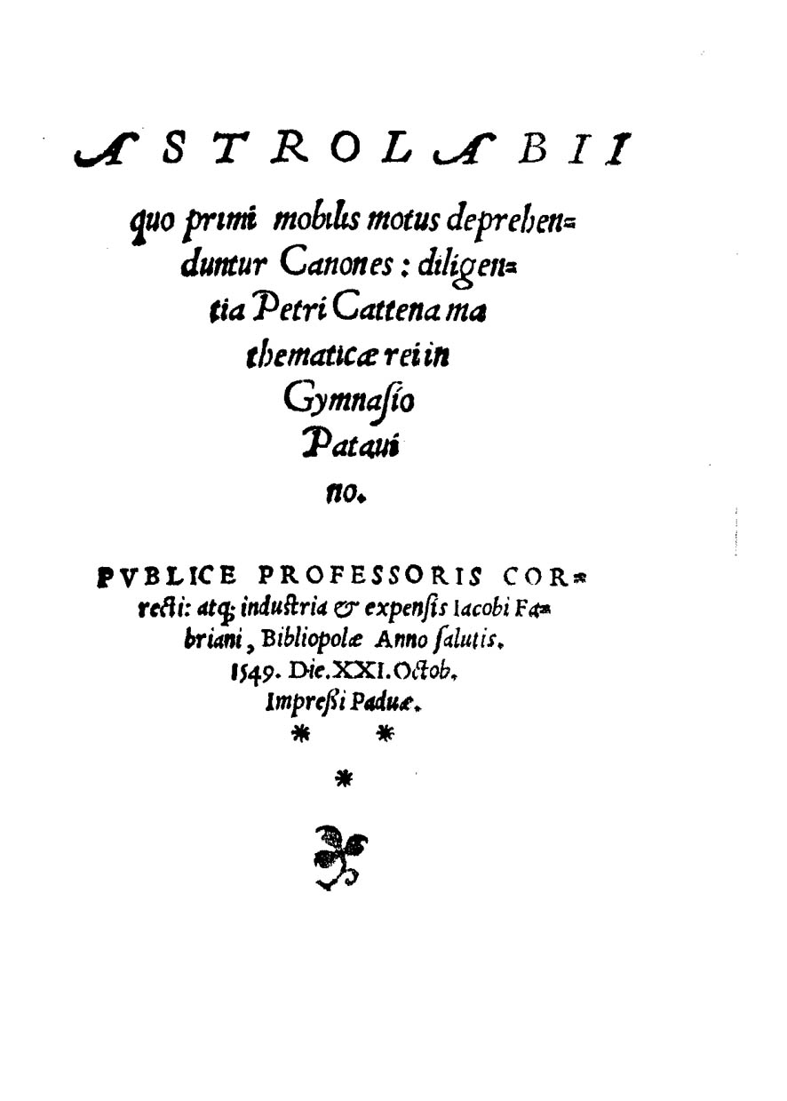 Astrolabii quo primi mobilis motus deprehenduntur canones: diligentia Petri Cattena mathematicae rei in Gymnasio Patavino vive correcti: .... - Impressi Paduae : industria & expensis Iacobi Fabriani, bibliopolae, 1549 (Iacobus Fabrianus). - [24] c. ; 8º .